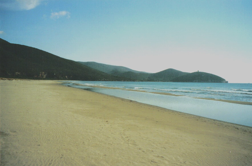 Spiaggia di Marina di Alberese (GR)